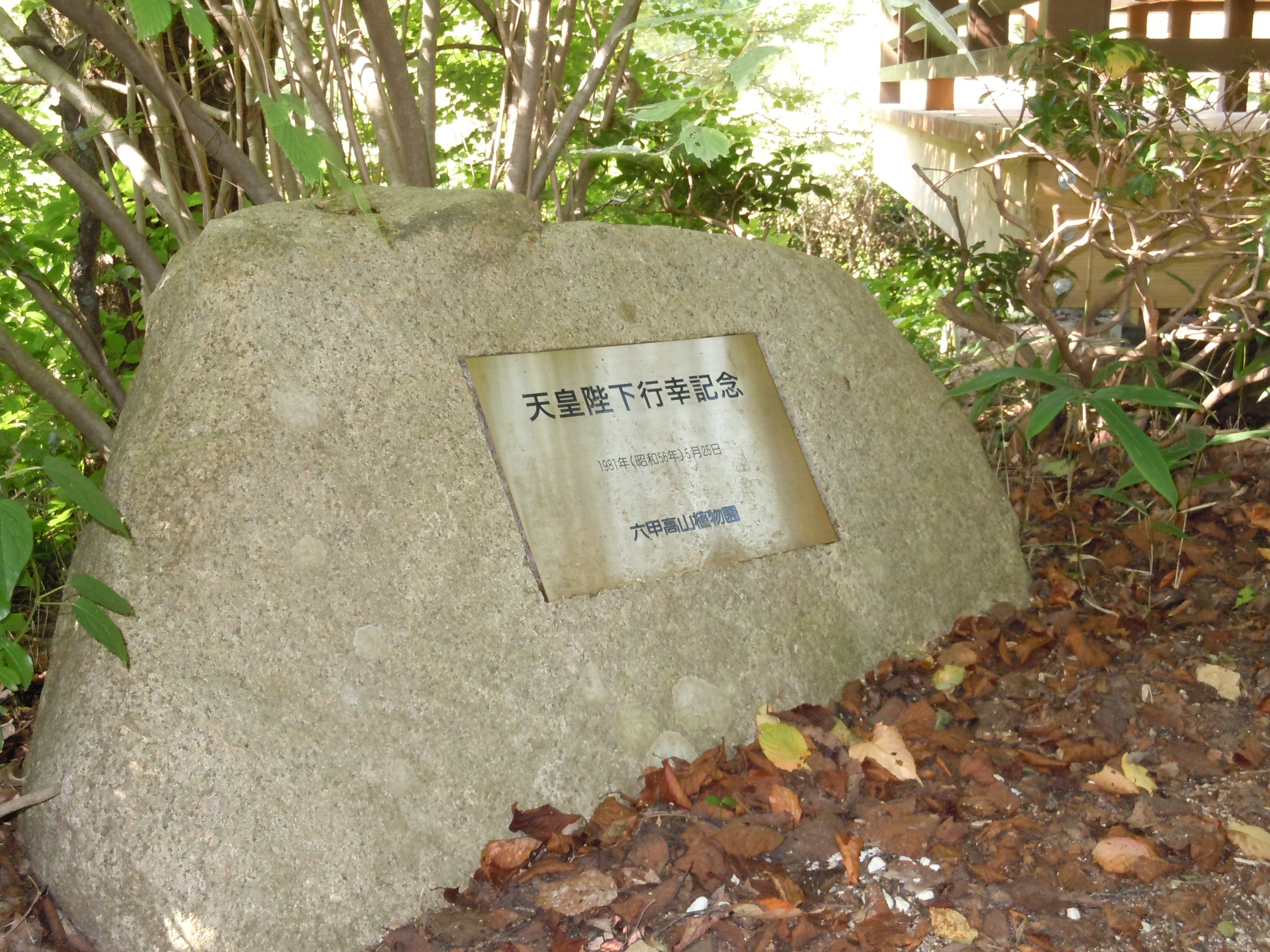 園内にある昭和天皇の行幸記念碑